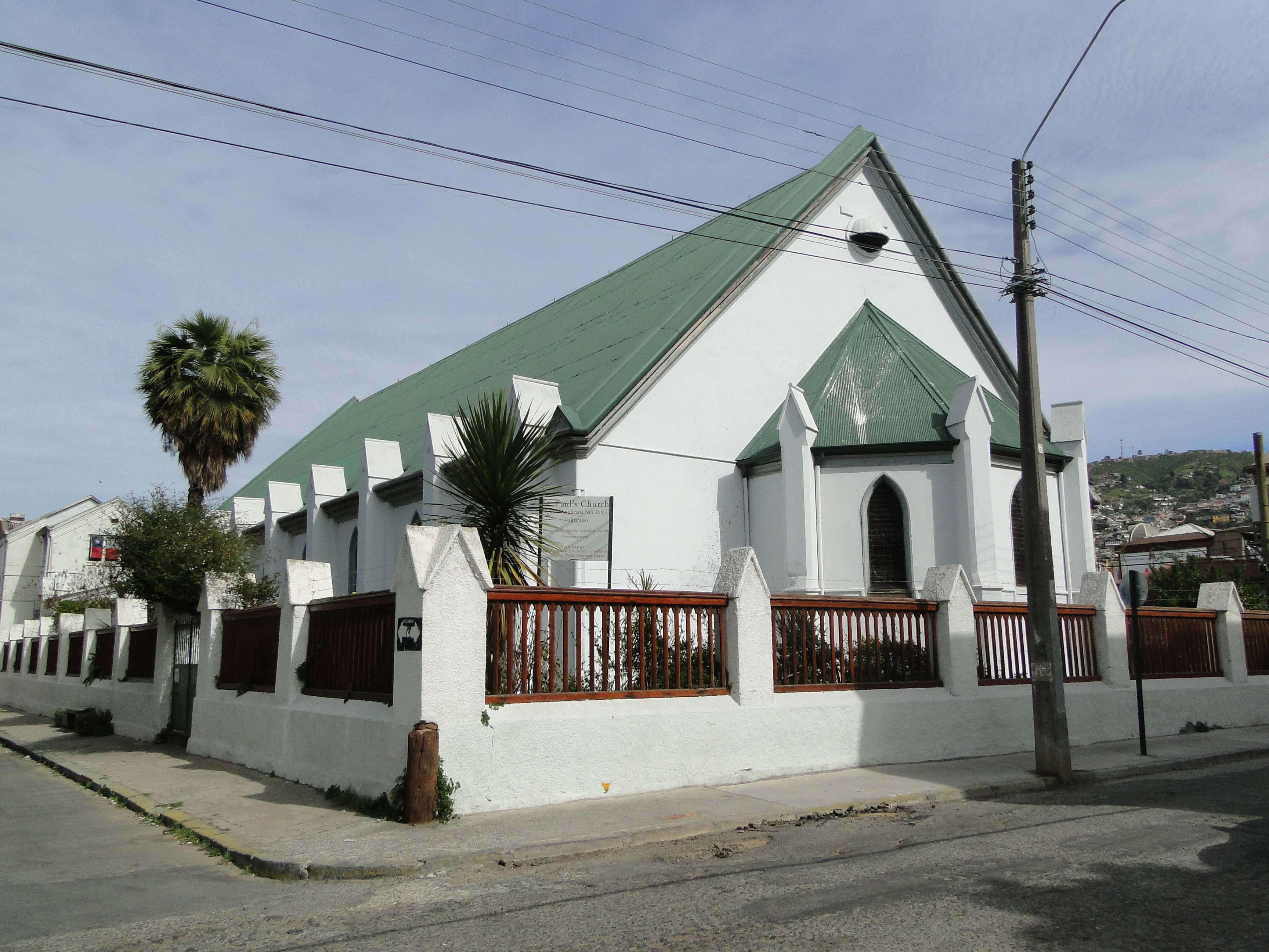 Iglesia Anglicana de San Pablo This is a photo of a national monument in Chile: 620